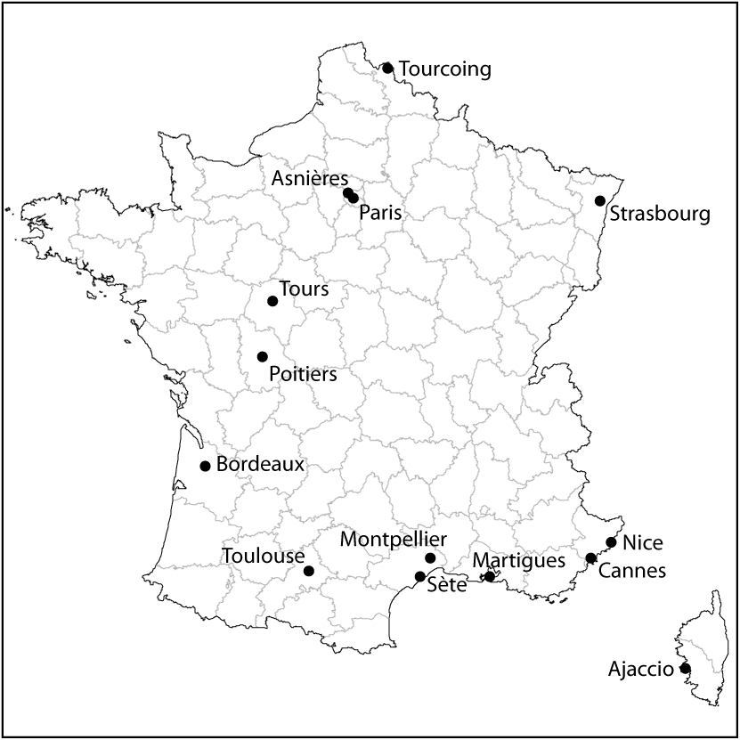 Carte des clubs engagés dans le championnat de France Pro A de volley-ball 1999-2000